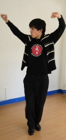 Fotografía tomada por Pedro Parraguez (2011) en el Seminario de flamenco semestral dictado por Leonardo Matamala.